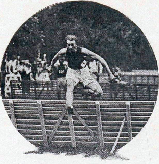 Alvin Kraenzlein, champion olympique des 110 et 400 mètres haies aux JO de 1900.